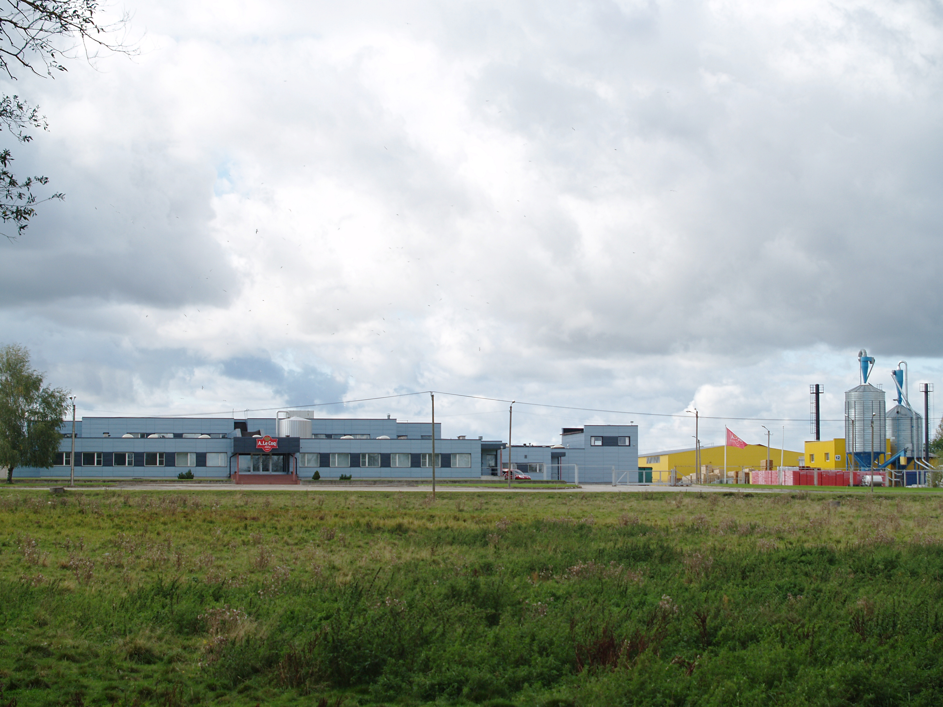 A. Le Coqi Reola tootmishooned.